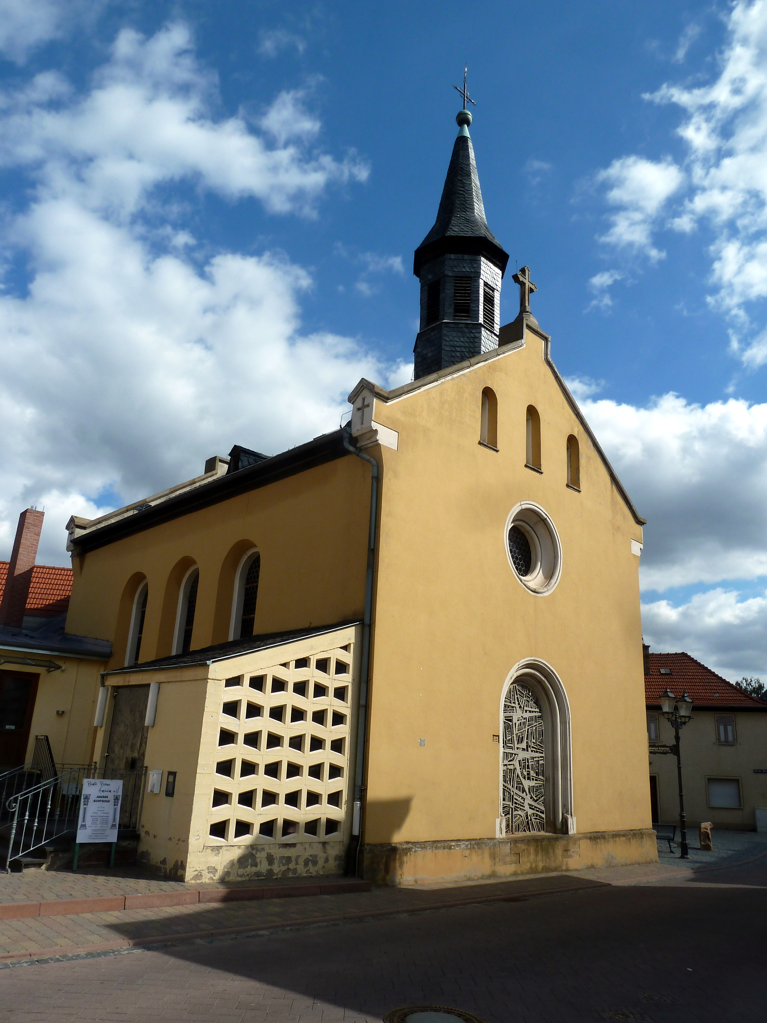 St. Remigius, Kath. Kirche in Armsheim, erbaut um 1863